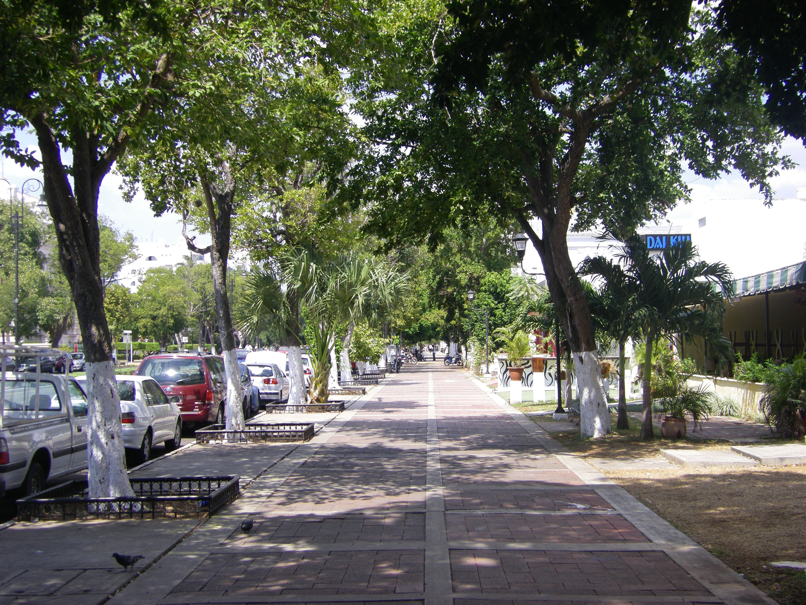 Paseo Montejo in Mérida, Mexiko